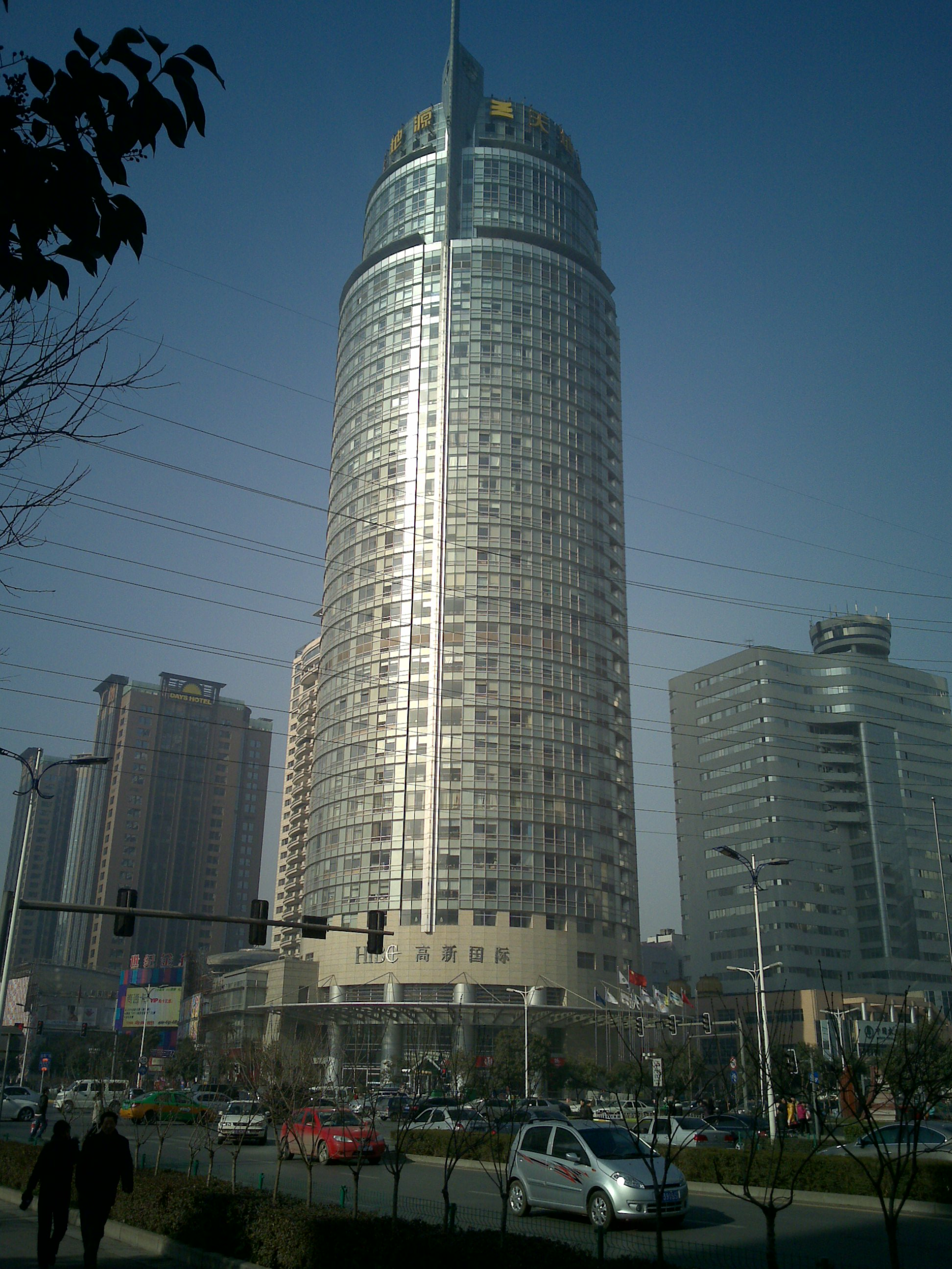 高新国际大楼